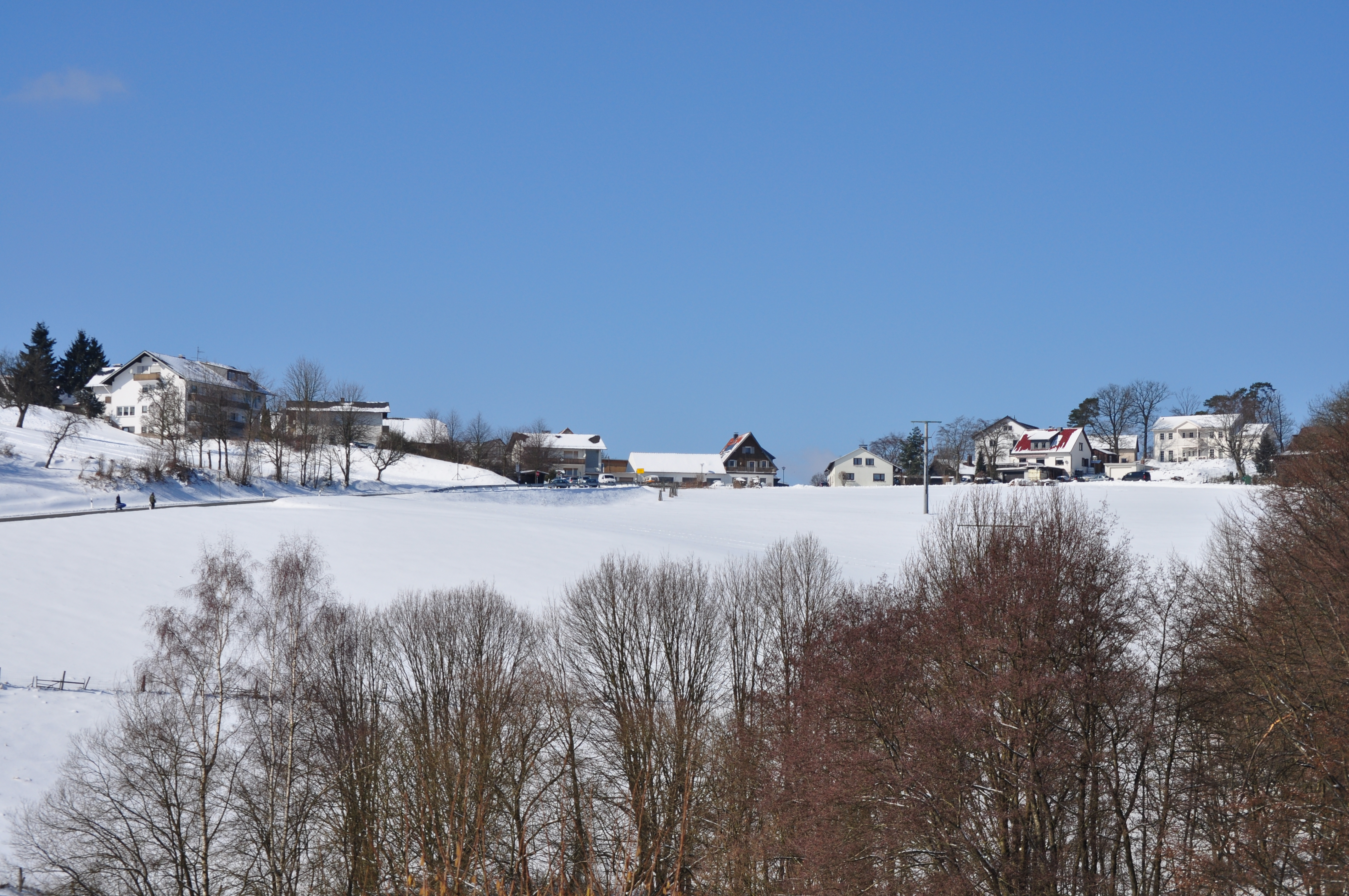 Ortseingang von Treisberg von der K742 fotografiert